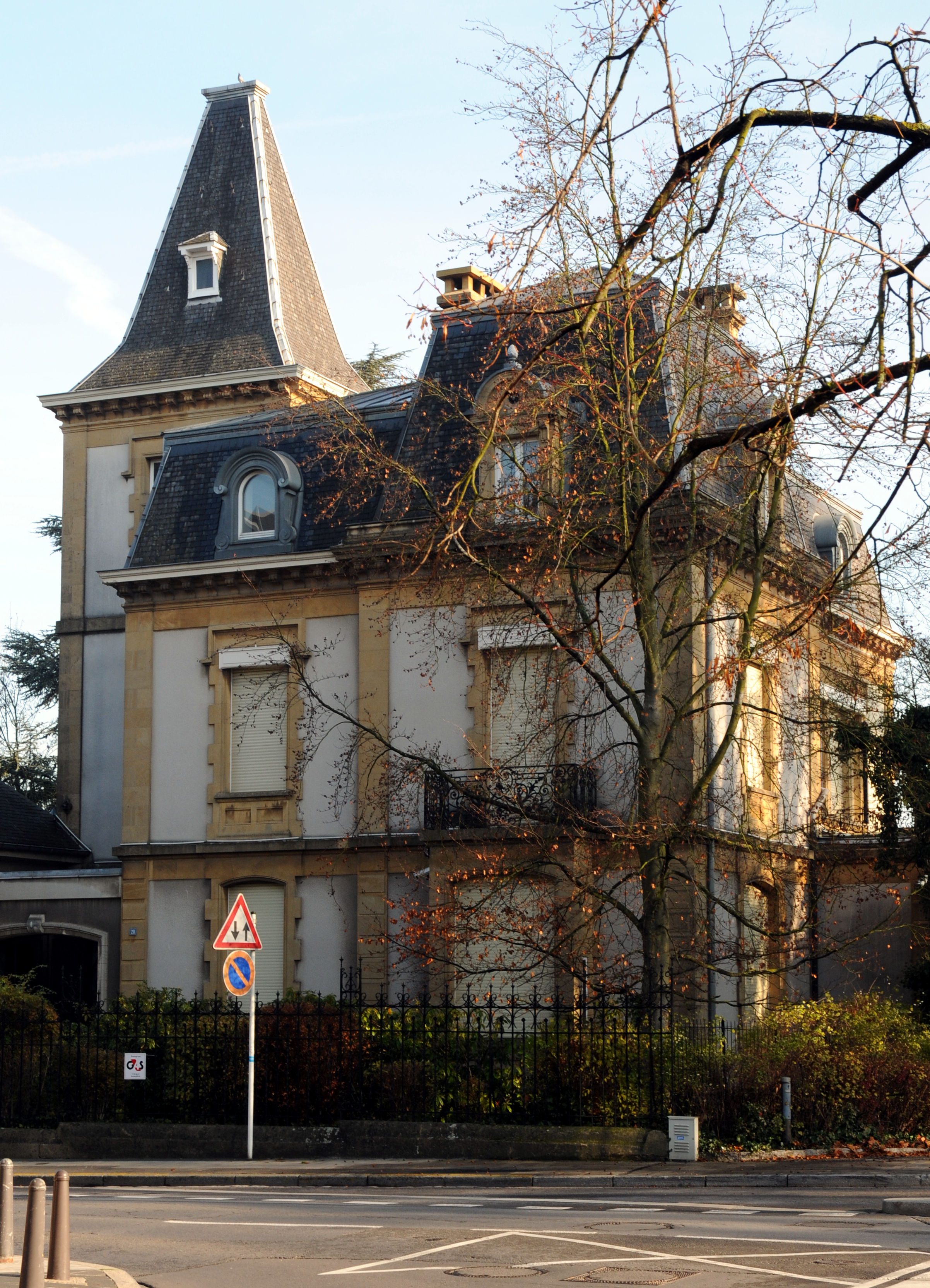 D'Villa Schwall-Lacroix op Nr 20 am Eecherbierg.